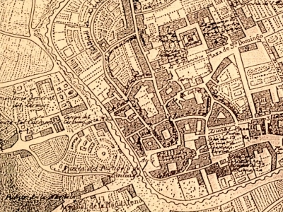 Mapa de Lugo elaborado por Francisco Coello de Portugal y Quesada a mediados del siglo XIX